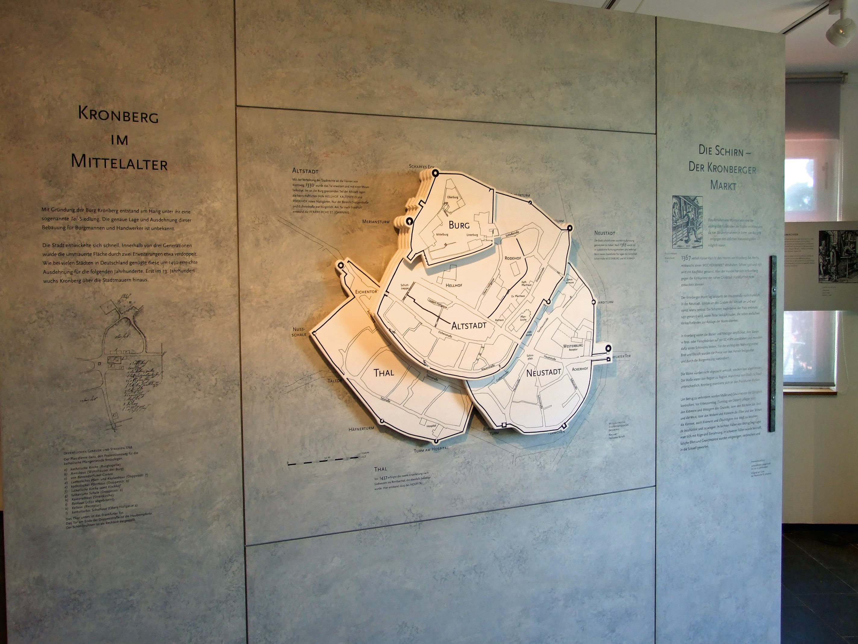 Grundriss im Mittelalter, im Kronberger Burgmuseum, Kronberg Ts.